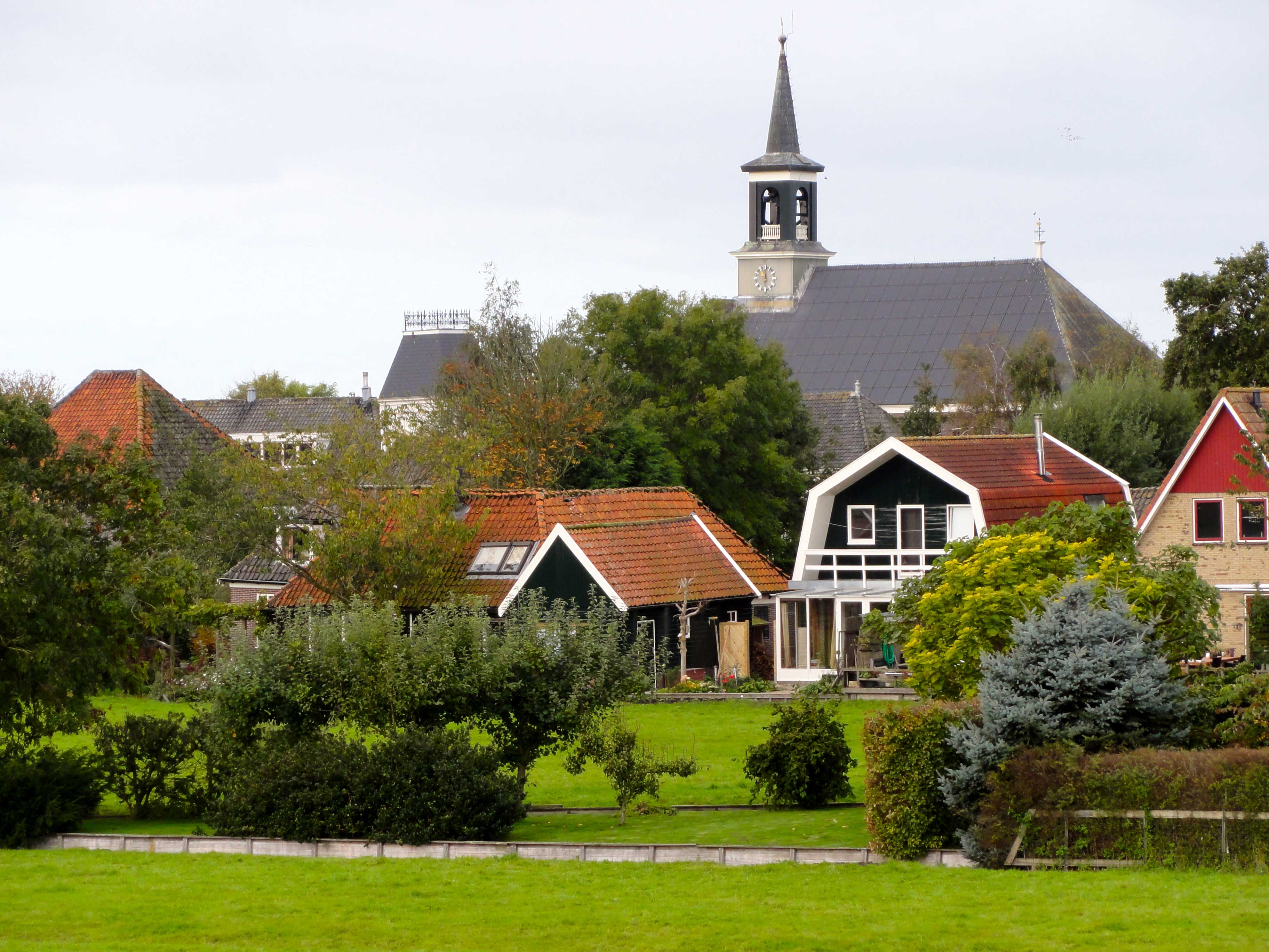 Voormalige Hervormde Kerk in Warder